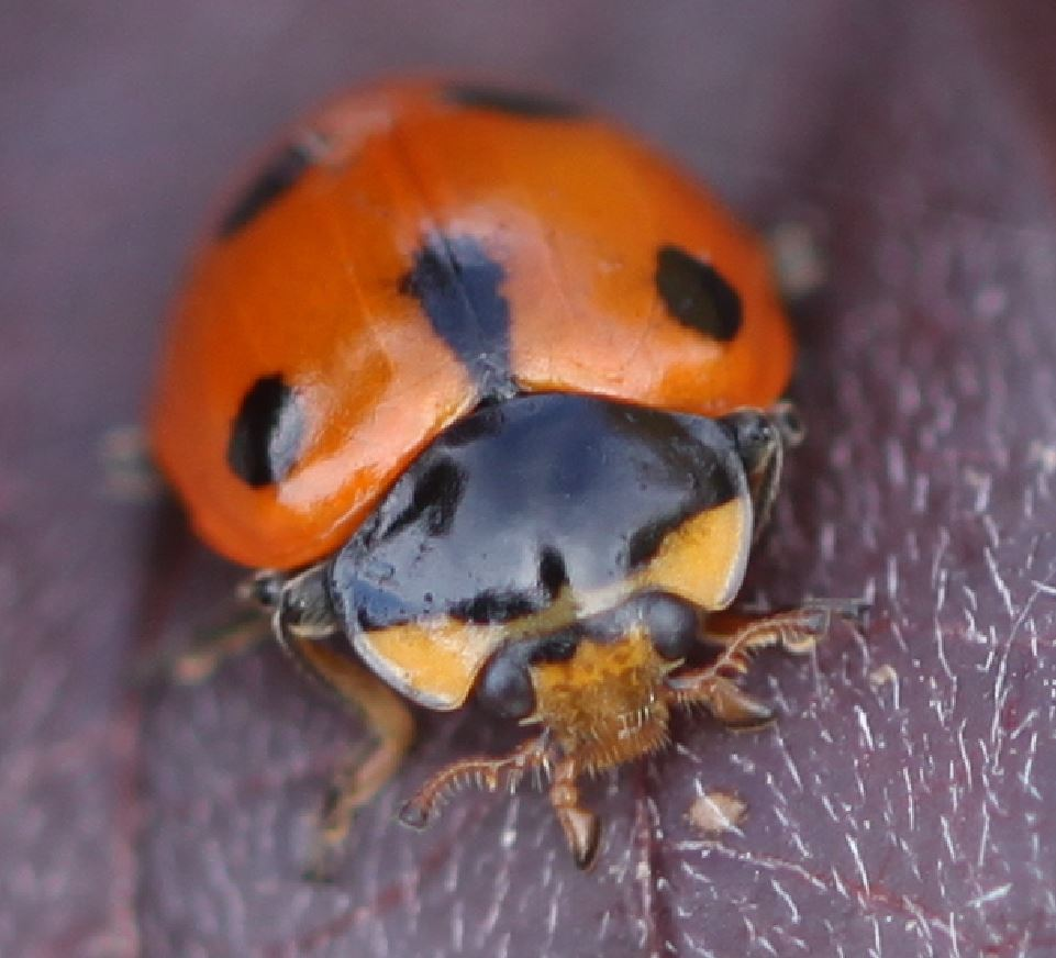 Marienkäfer Hippodamia undecimpunctata am 8. November 2018 in Walldorf/Baden